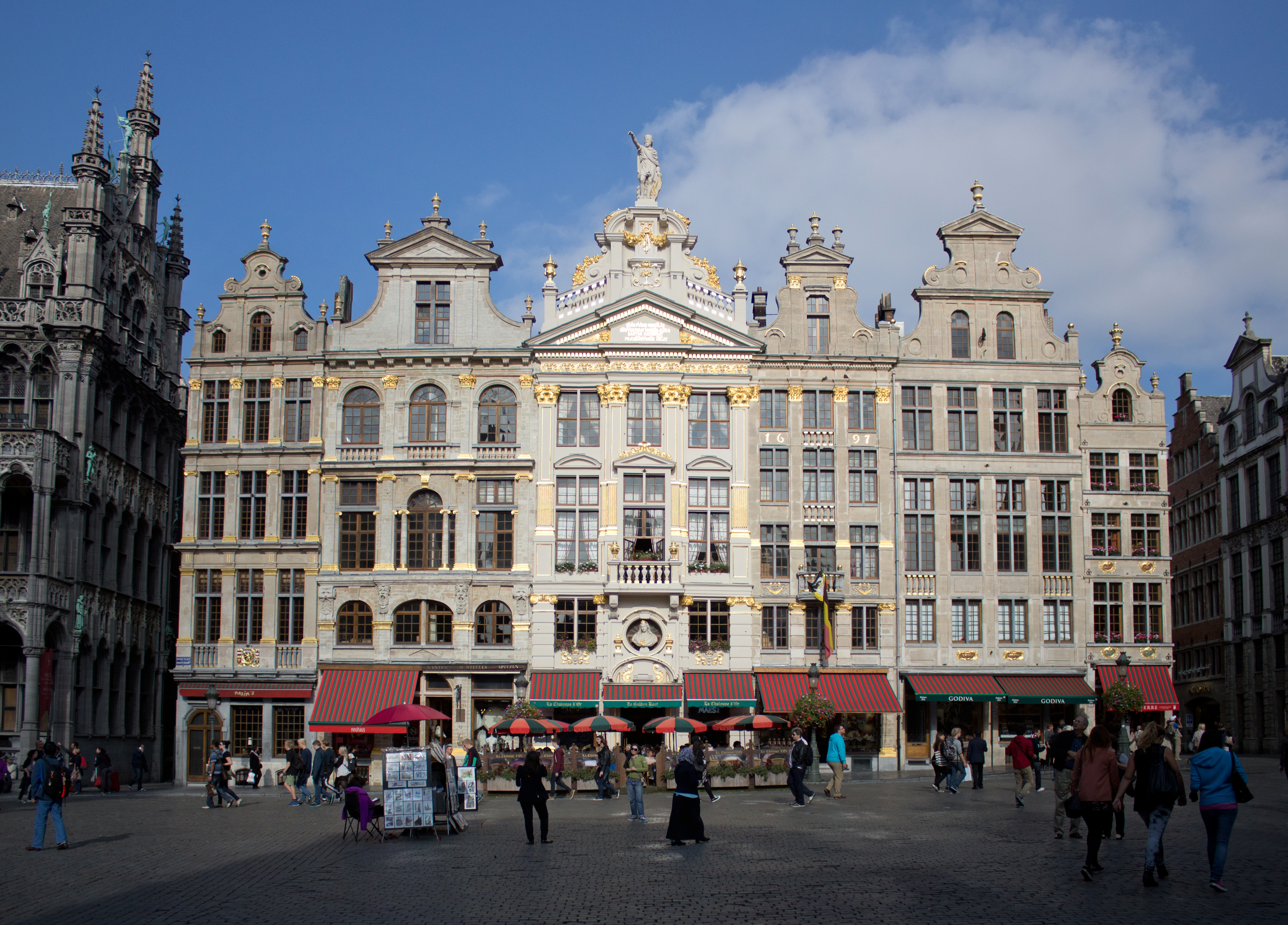 Grote Markt 24-25, Brussel